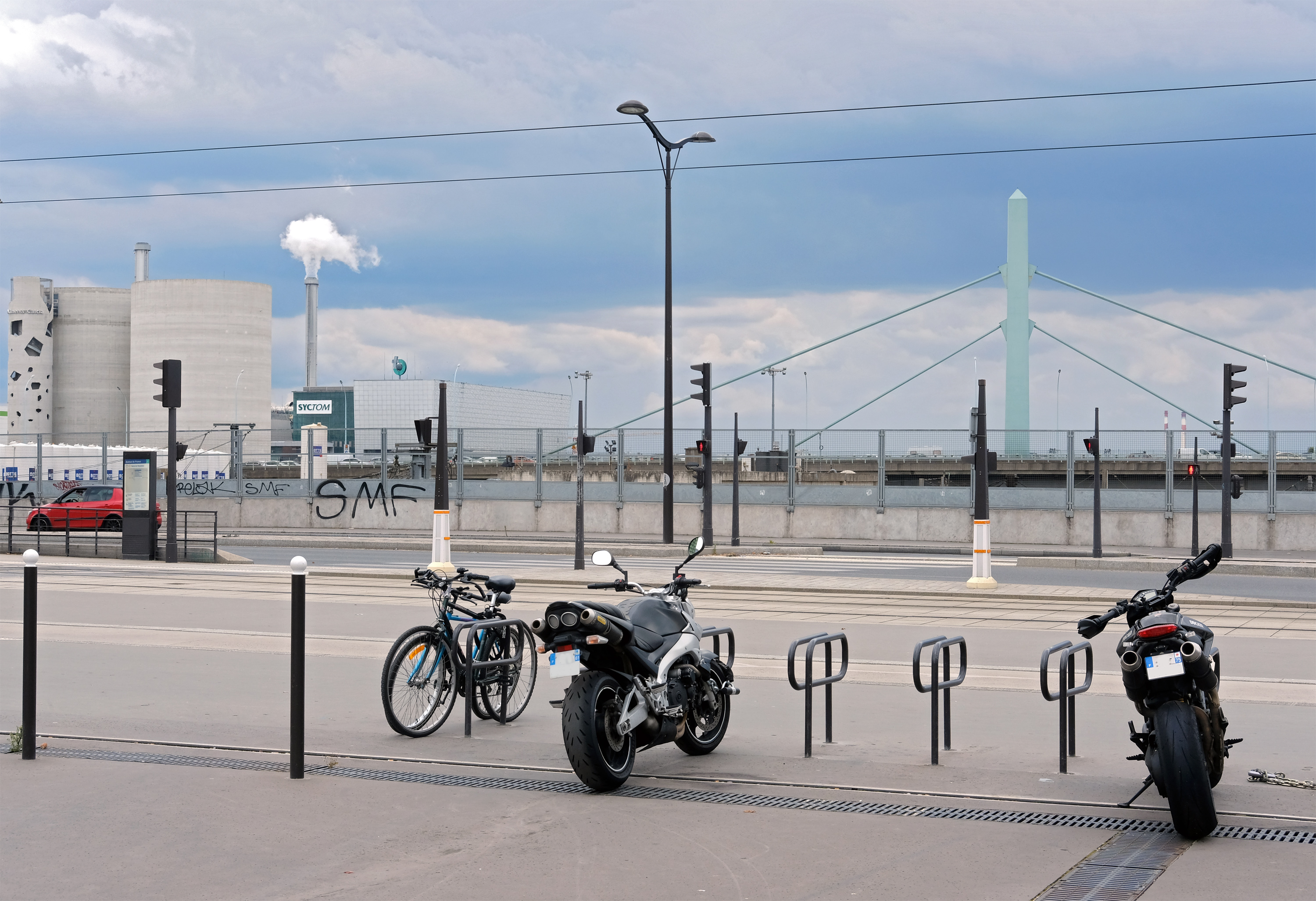 Boulevard du Général-d'Armée-Jean-Simon - Paris XIII